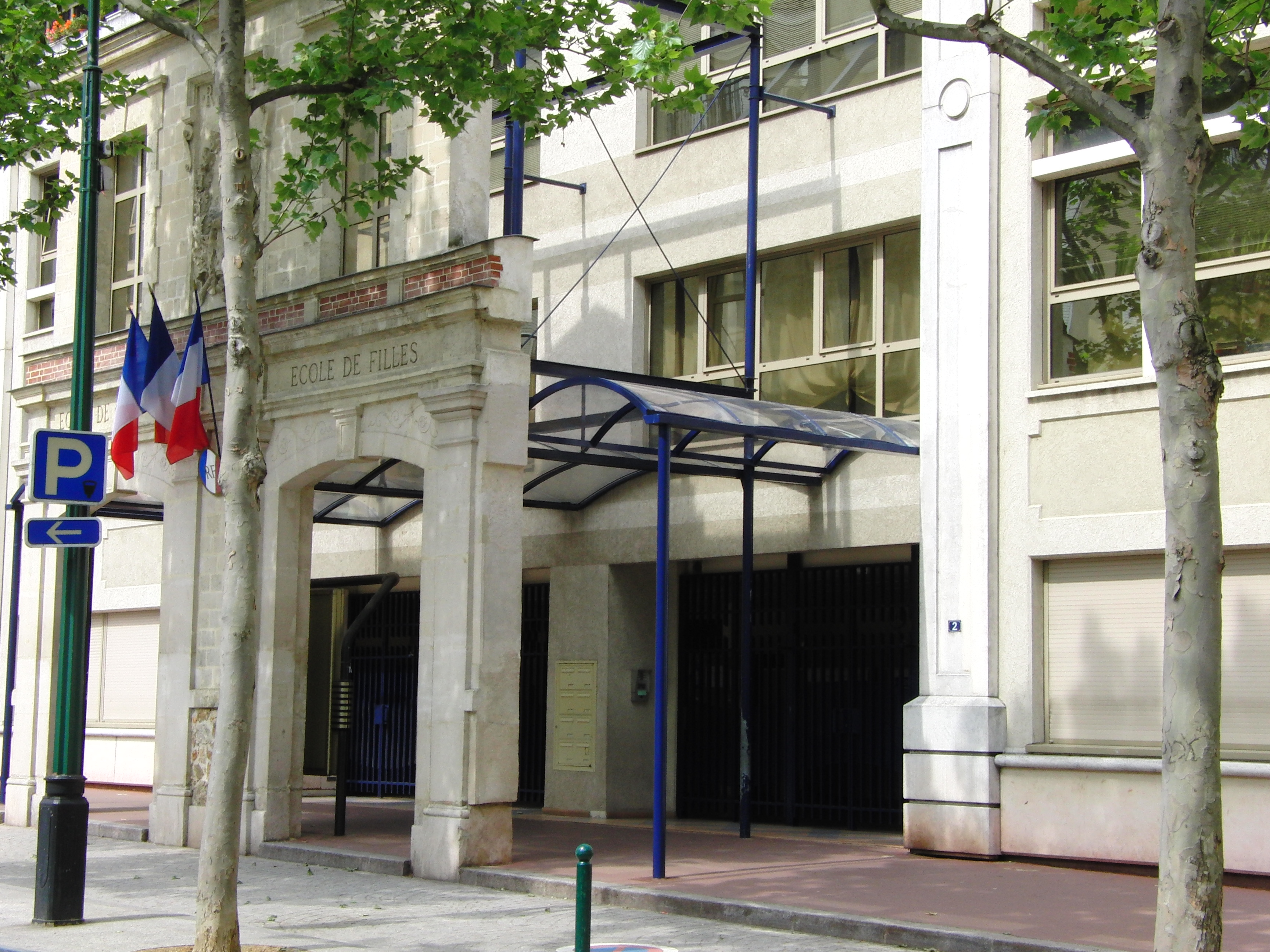 Ecole de Gravelle à Saint-Maurice